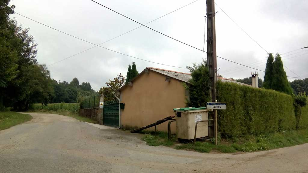 Vista de Cartas, Curtis.